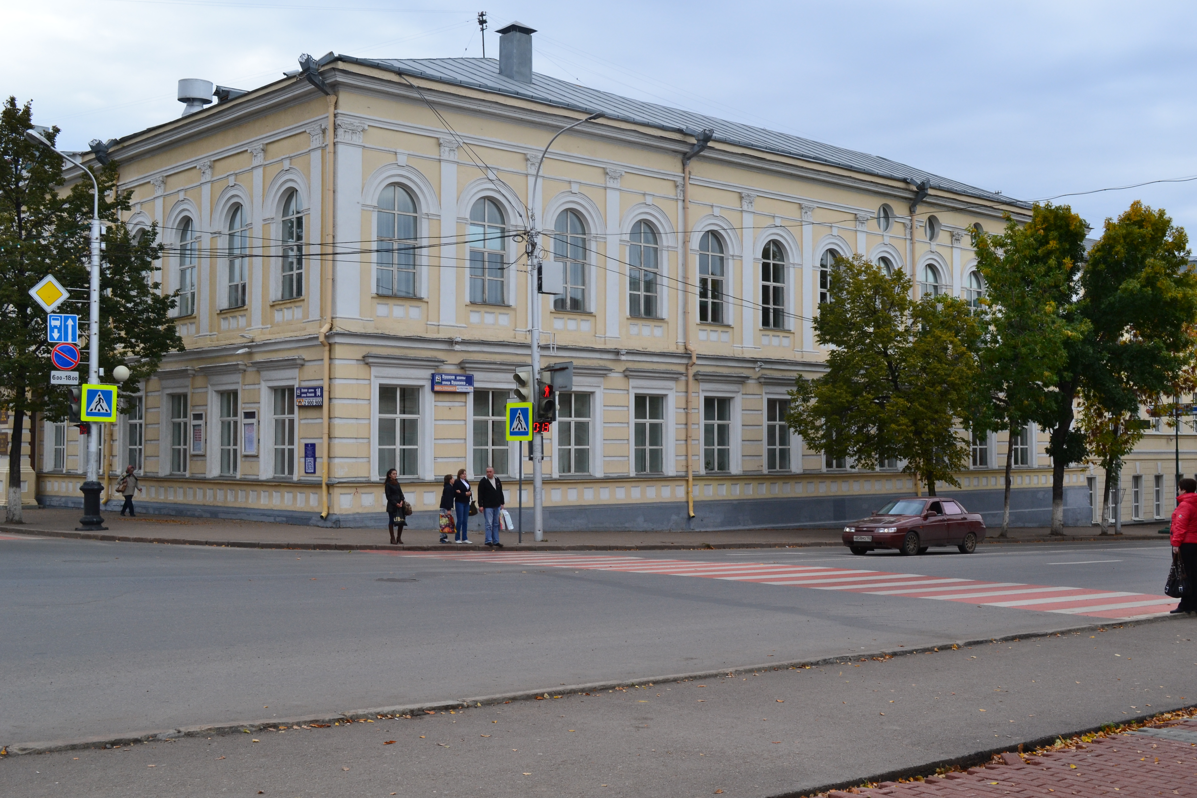 Здание дворянского собрания, здесь выступал Шаляпин Ф. И (Республика Башкортостан, Уфа, улица Ленина, 14)